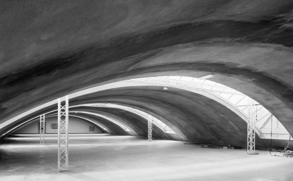 Nieuwe Bonnefantenmuseum: Interieur Wiebengahal (opmerking: Gefotografeerd voor Monumenten In Nederland Limburg)